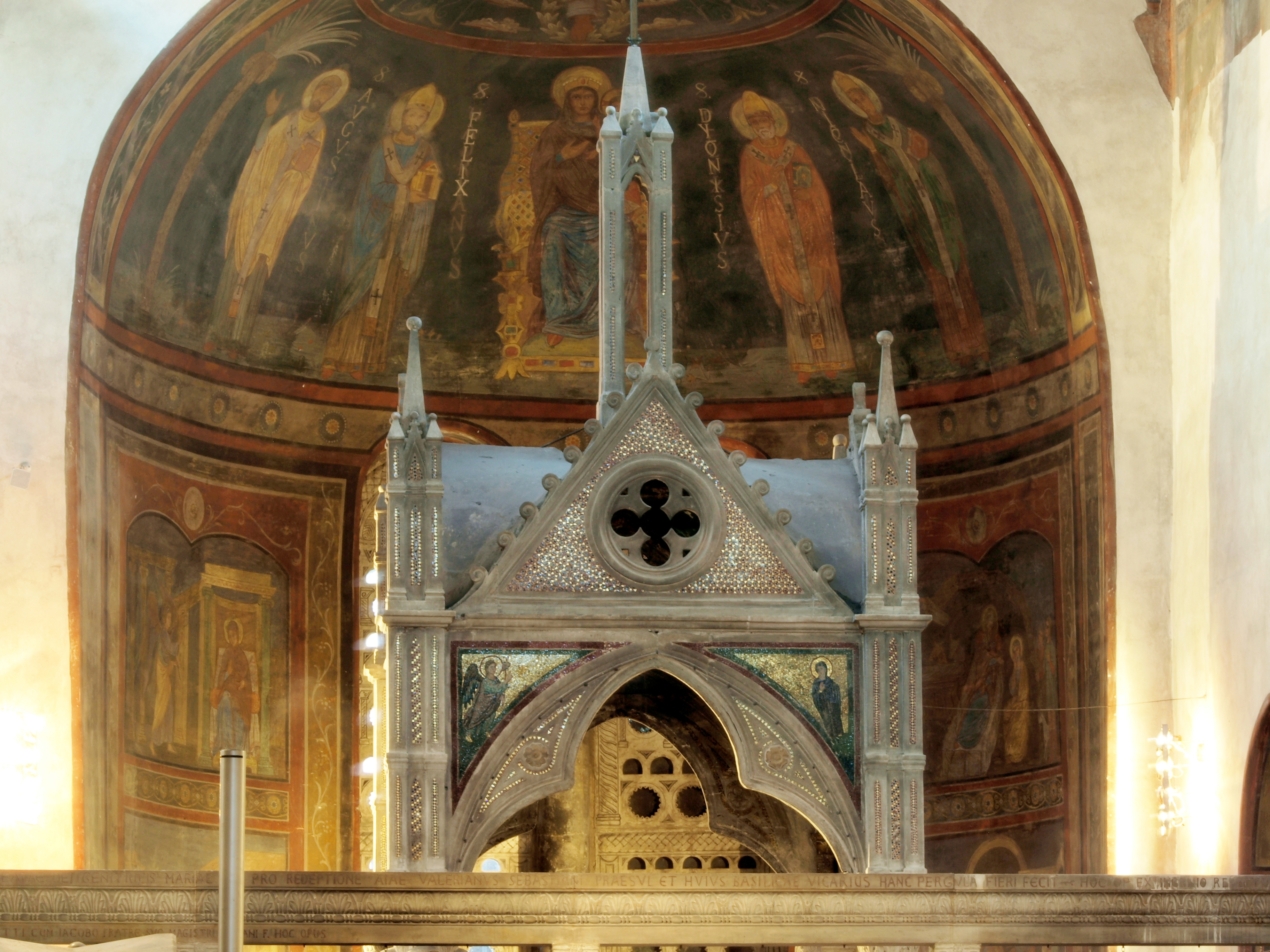 Santa Maria in Cosmedin (Rome)